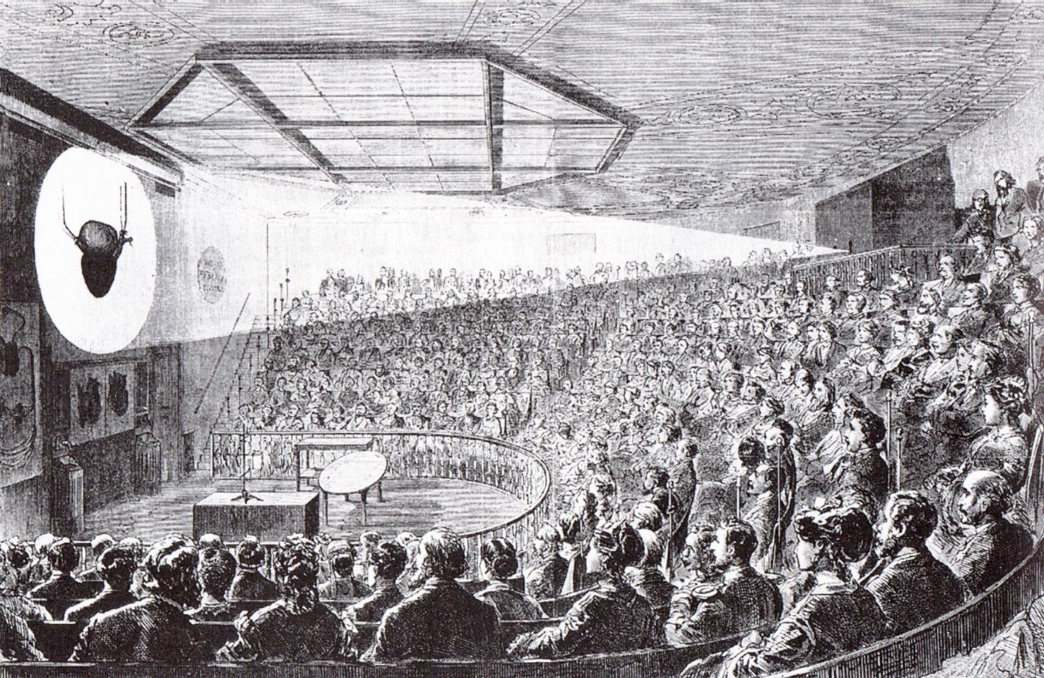 Demonstrationsvorlesung in Czermaks Spektatorium (Seziertes schlagendes Froschherz)